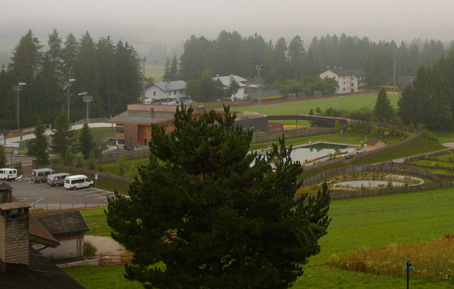 La zona sportiva nord a Dobbiaco, con la piscina naturale